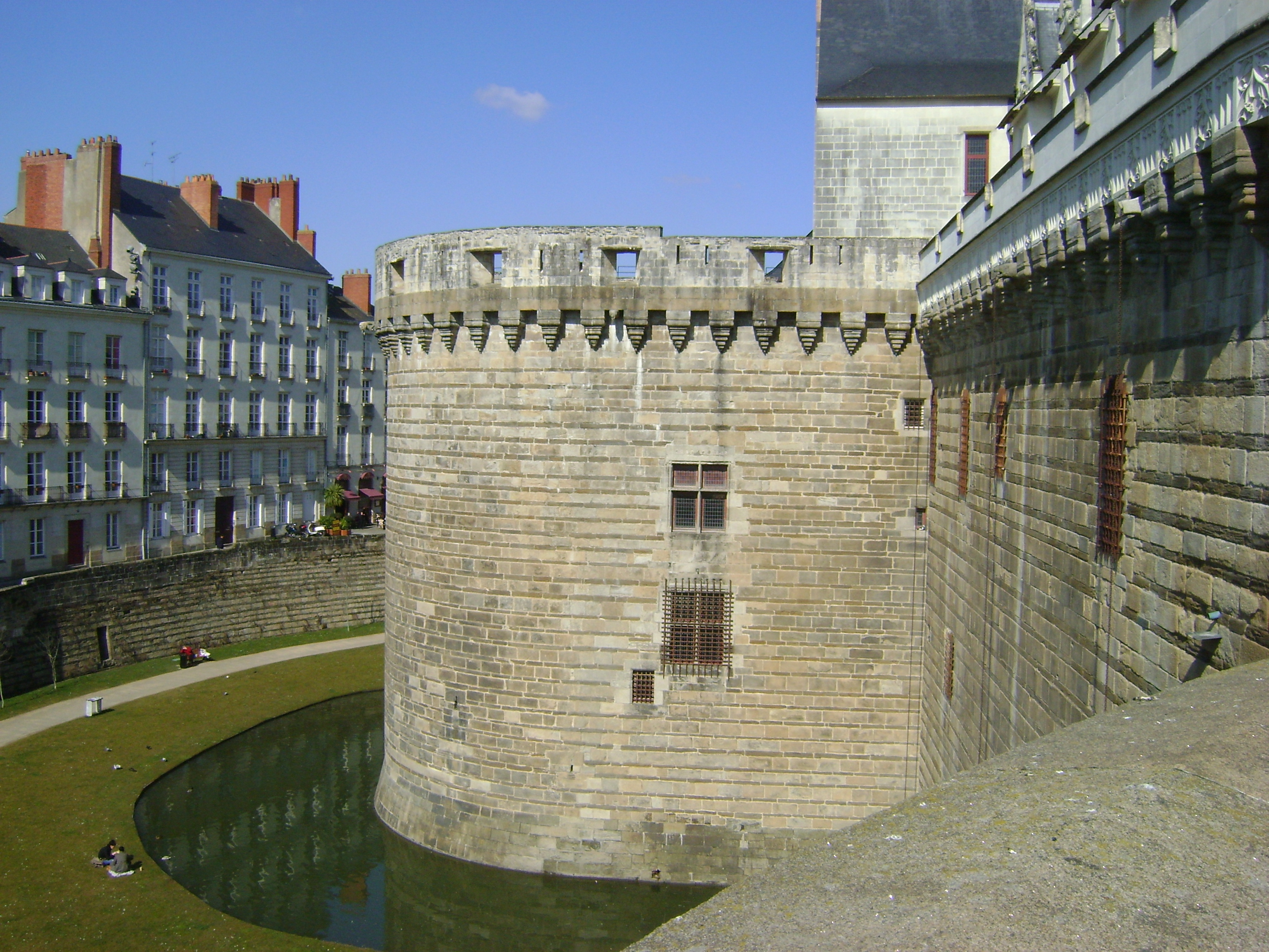 Château des Ducs de Bretagne, Nantes. La Tour des Jacobins. .